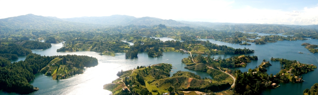 Embalse de Guatapé, Departamento de Antioquia. colombia